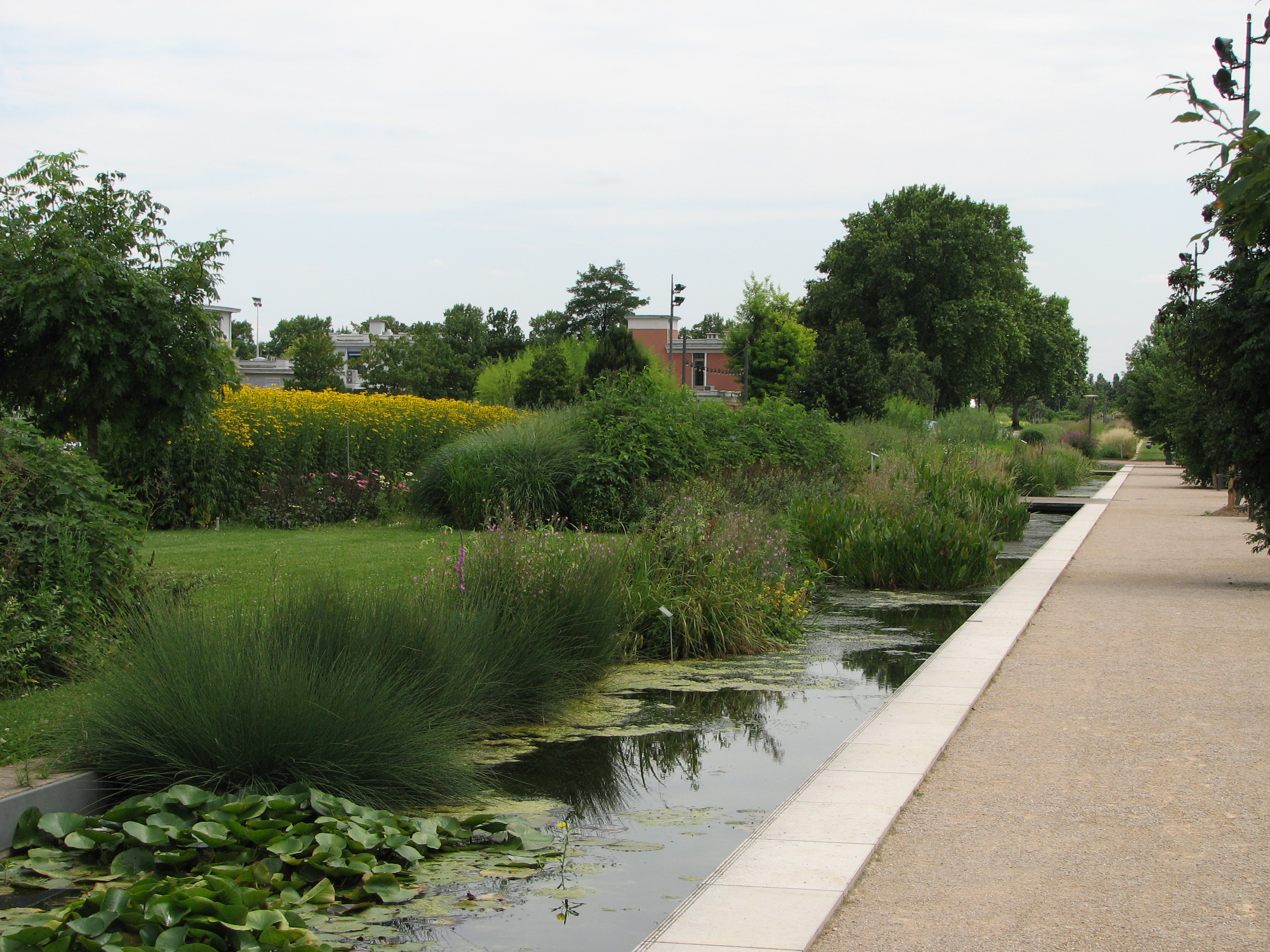 Mégaphorbiaie au Parc de Gerland à Lyon